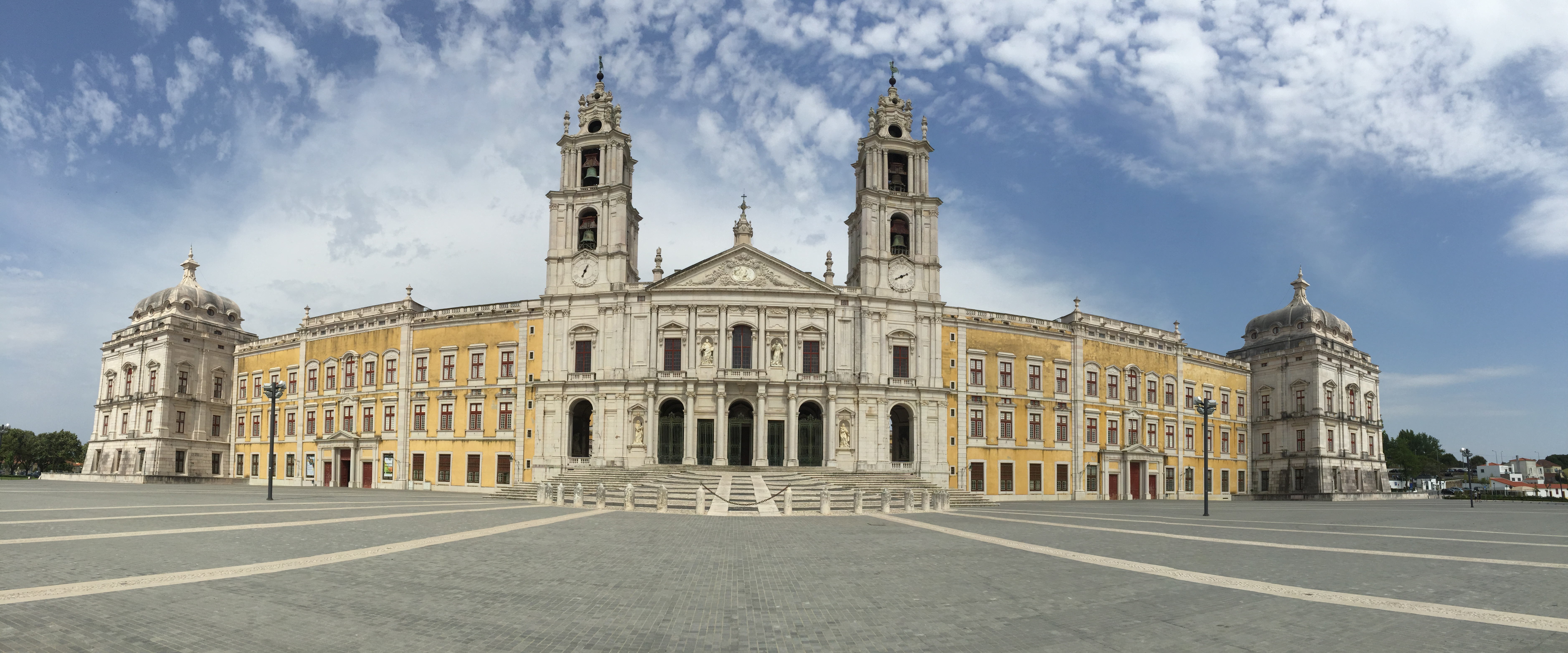 2640 Mafra, Portugal